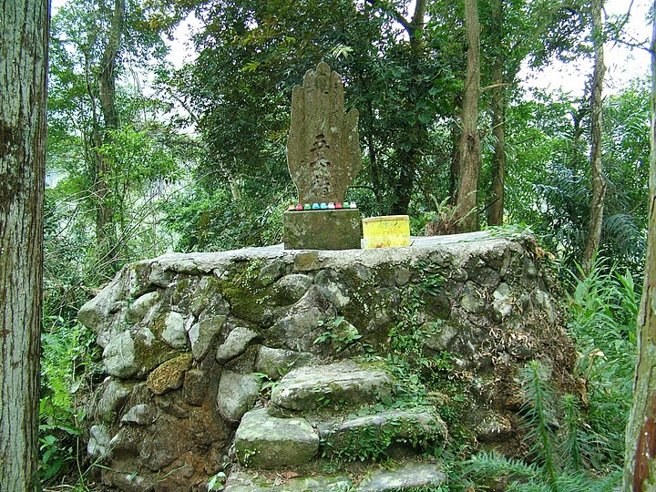 北埔事件五子碑。暴動によって、殺された5人の日本子供たち。